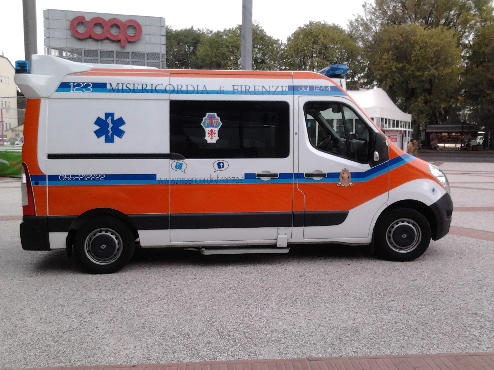 AMBULANZA DISLOCATA IN SEZIONE OLTRARNO